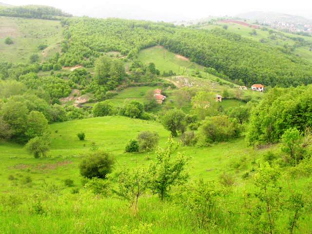 Gurina